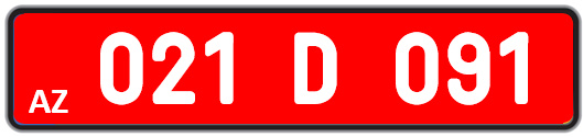 Azərbaycan Respublikası avtomobil dövlət qeydiyyat nişanı - Diplomatik